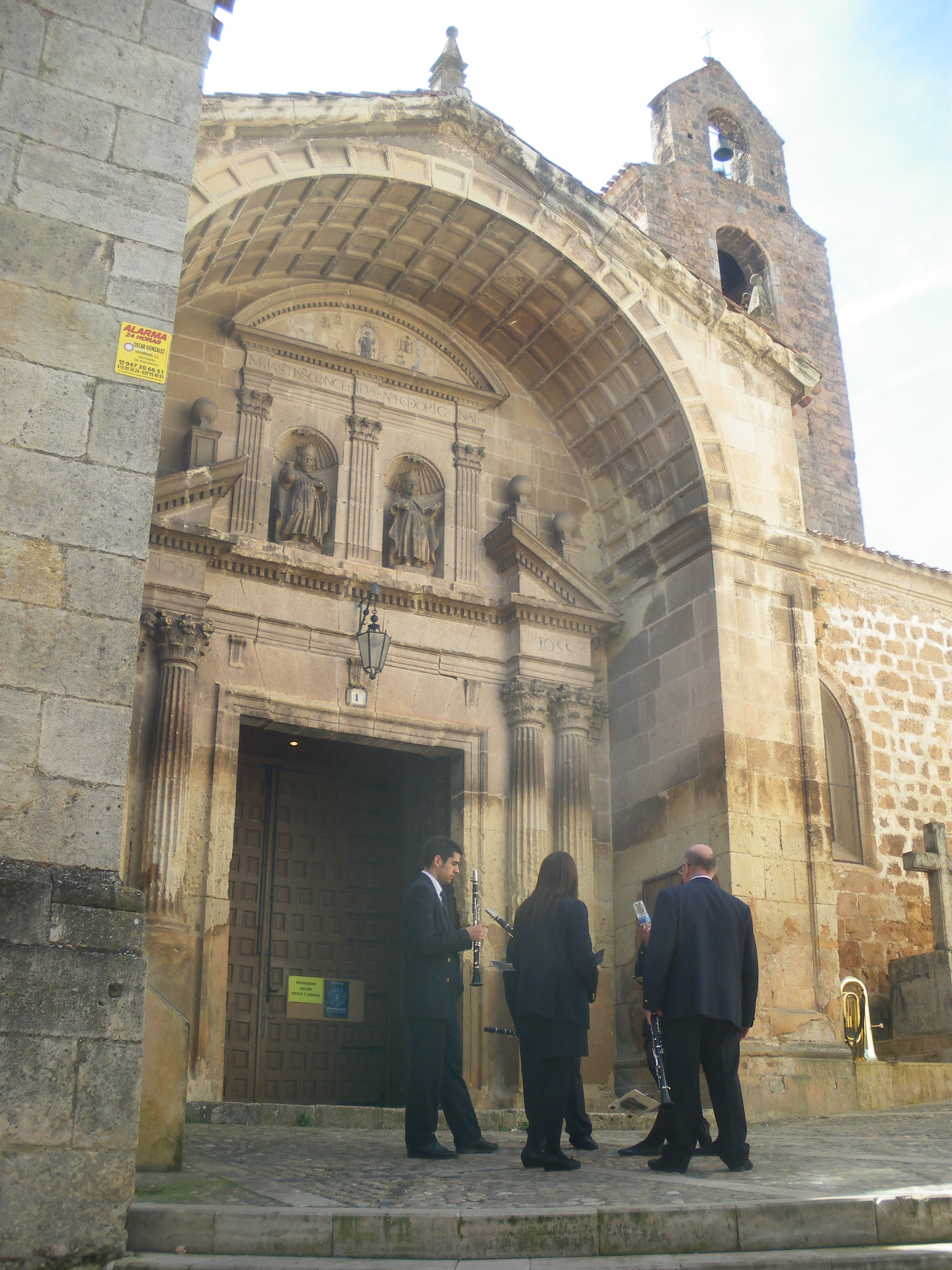 Poza de la Sal, provincia de Burgos, Castilla y León, España.